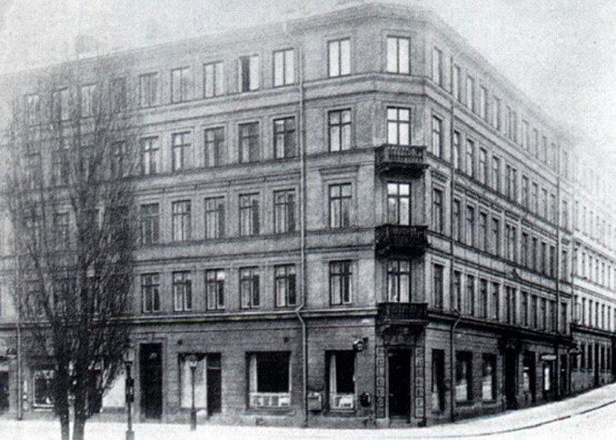 Radiumhemmets lokaler vid Scheelegatan i Stockholm 1910-1916